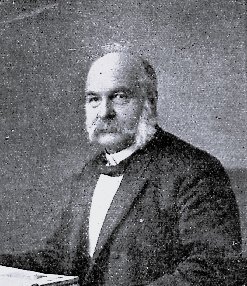 Dr. jur. Eduard Hach, Regierungsrat und Senatssekretär a. D.